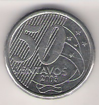 Frente da moeda de 50 centavos da segunda geração. Cunhada em 2003. This graphic was created with GIMP.